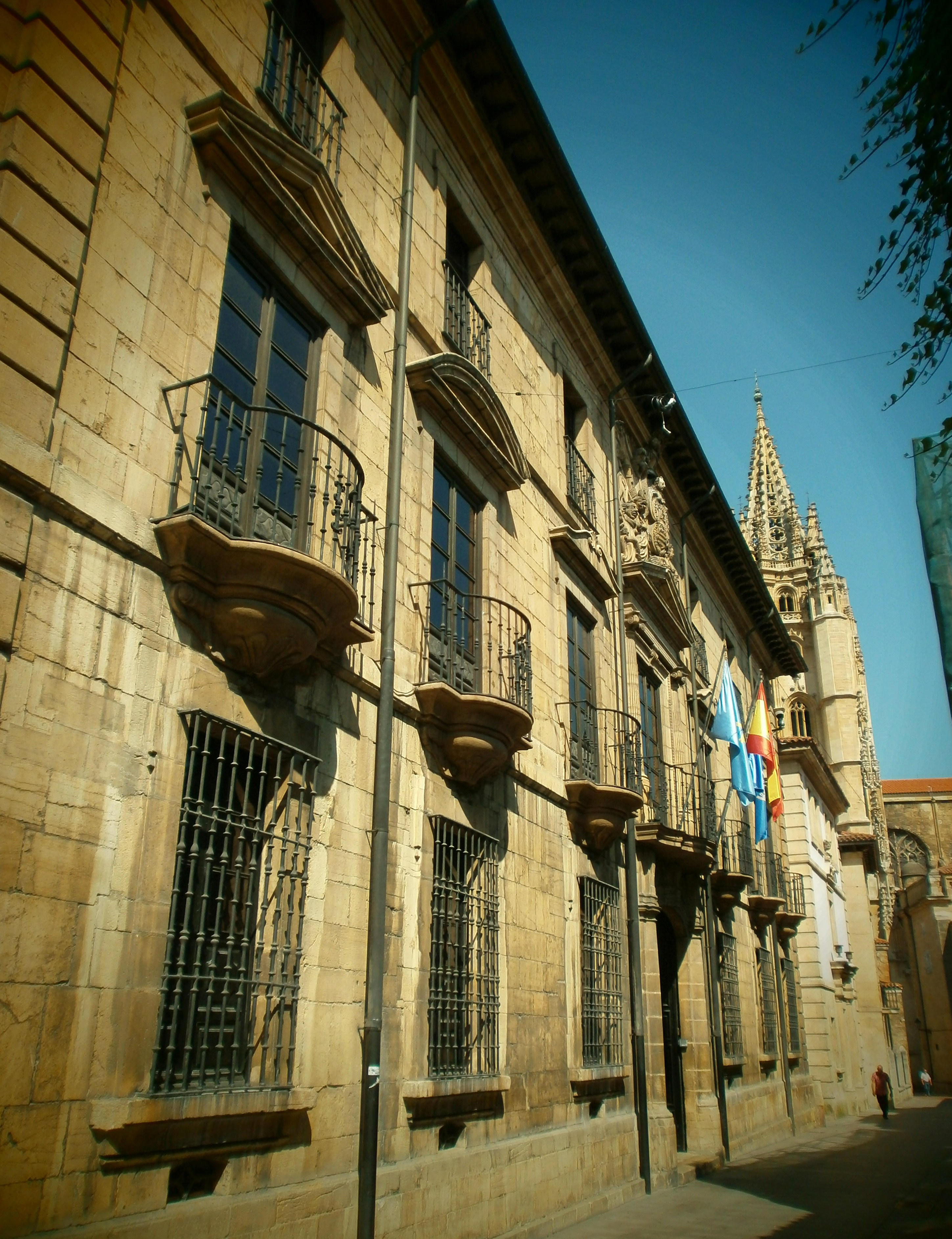 Palacio de Velarde Catedral al fondo.